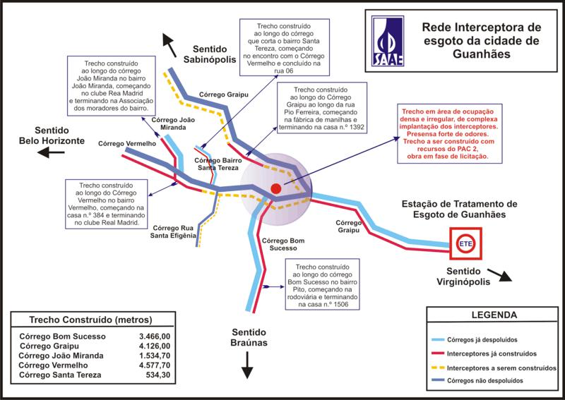 Mapa da rede coletora e interceptora de esgoto já construída e a construir, em Guanhães, MG.